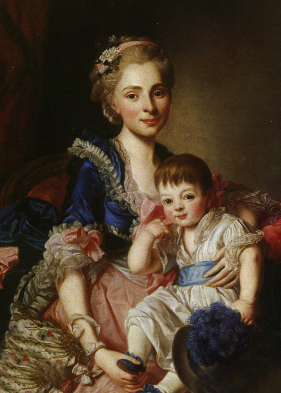 Княгиня Наталья Петровна Голицына, ур.Чернышёва с сыном или портрет графини Екатерины Петровны Строгановой (1744—1815) с сыном.